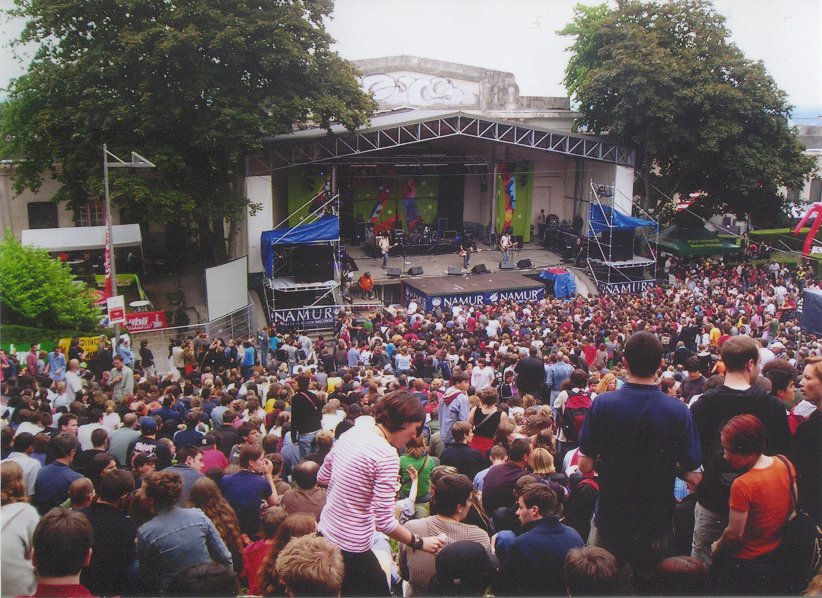 Verdur Rock, Namur (c) Jacques Leurquin